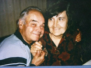 Анашкины Иван Николаевич и Антонина Федосеевна